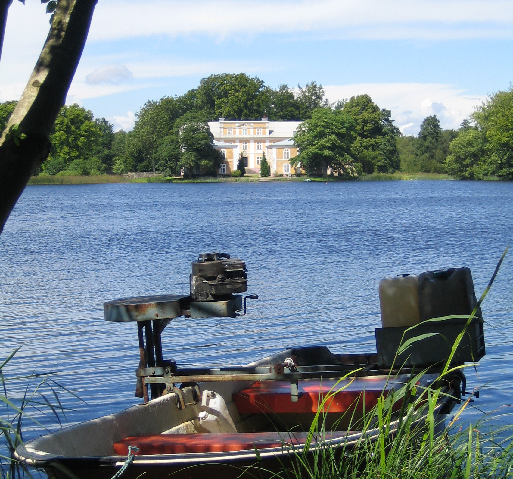 Tunbyholmssjön 2007